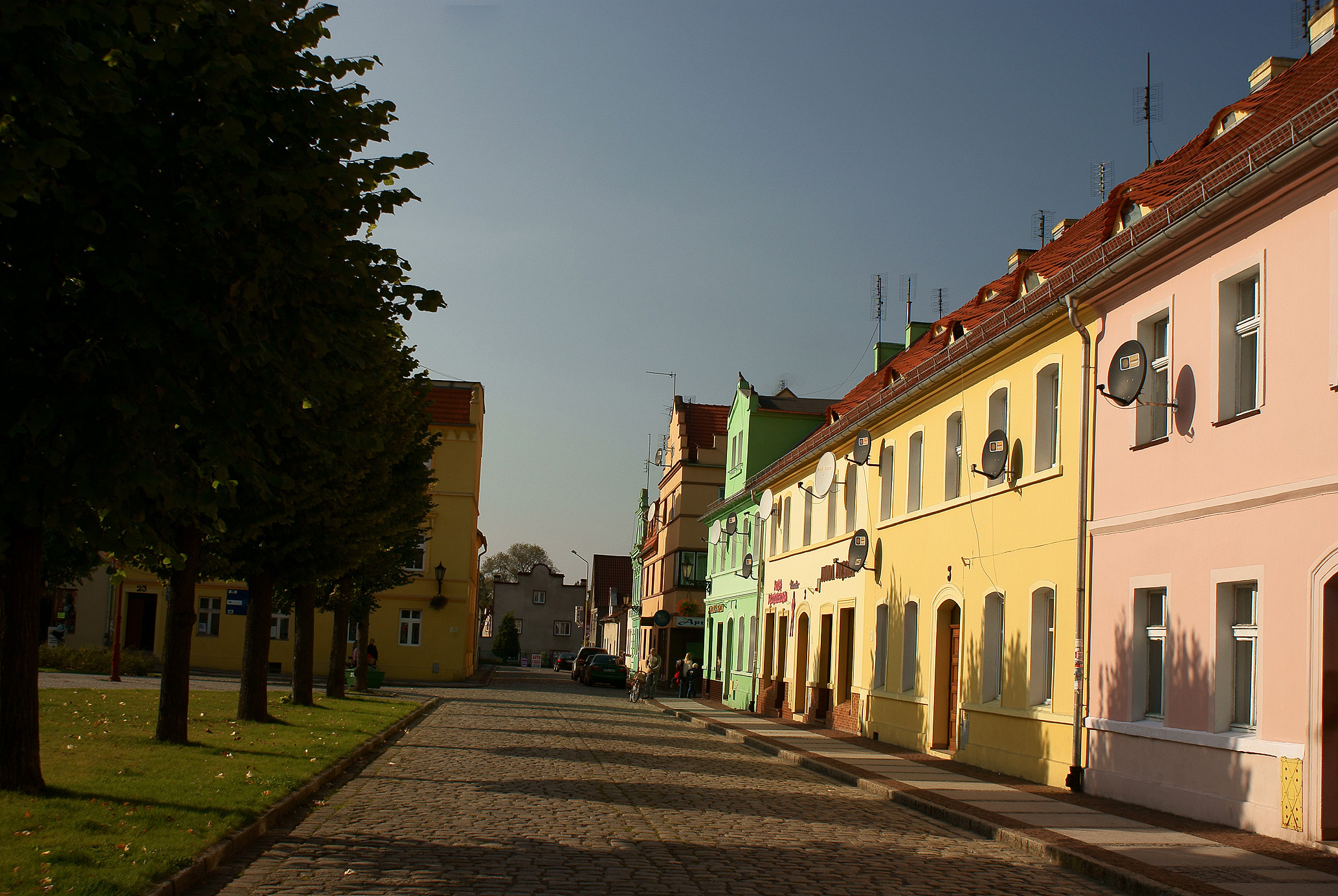 Miasto Chocianów, Chocianów 25.11.56.